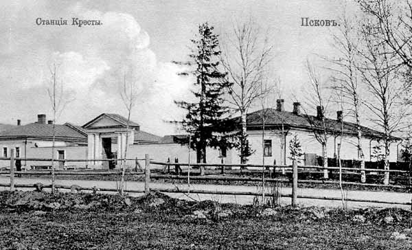 Почтовая станция в Крестах на окраине Пскова. Дореволюционная открытка